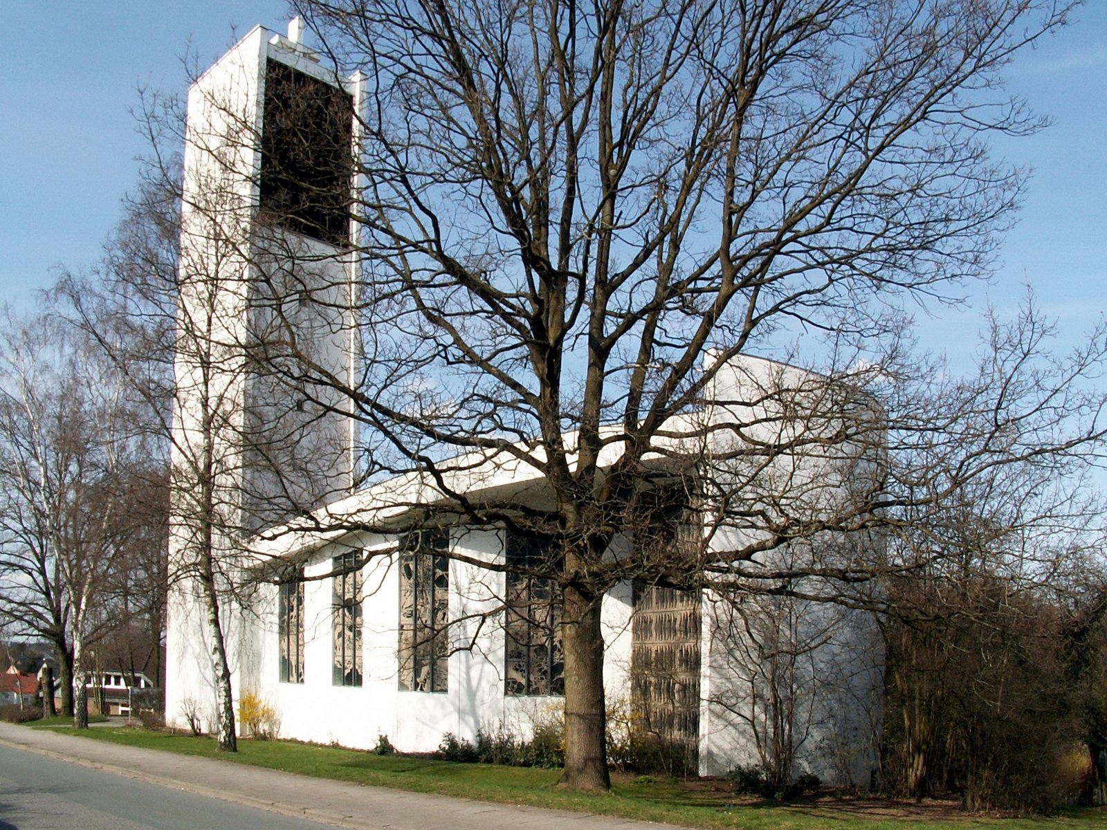 ev. Melanchthonkirche in Osnabrück, Stadtteil Kalkhügel, Ansicht von Süden